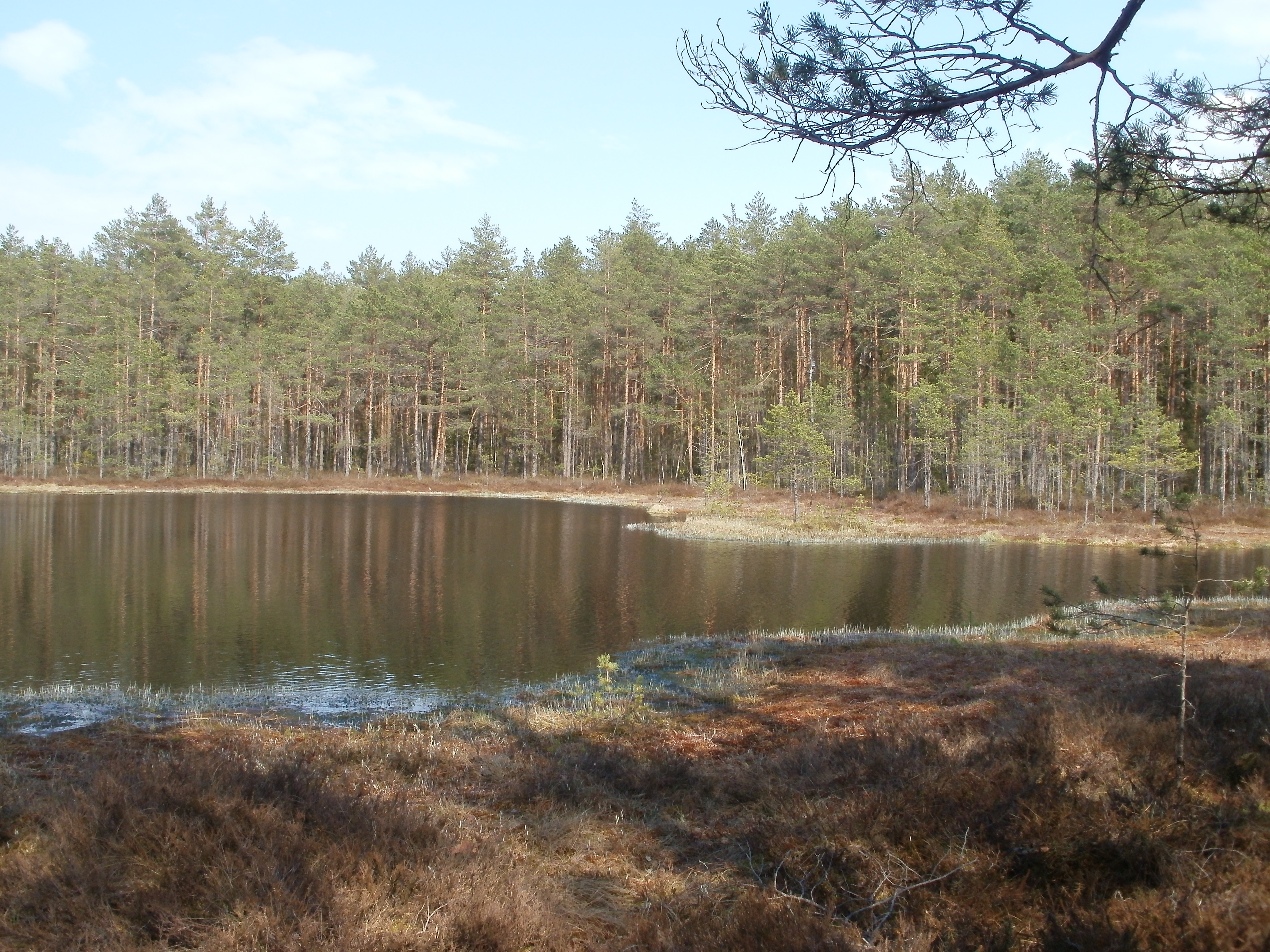 Mazais Kausezers